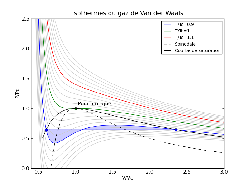 Isothermes P-V de l'équation d'état de Van der Waals. Règle du palier de Maxwell appliquée à l'équation d'état de Van der Waals : la ligne horizontale est tracée de façon à couper la ligne isotherme théorique en délimitant deux surfaces d'aires égales.